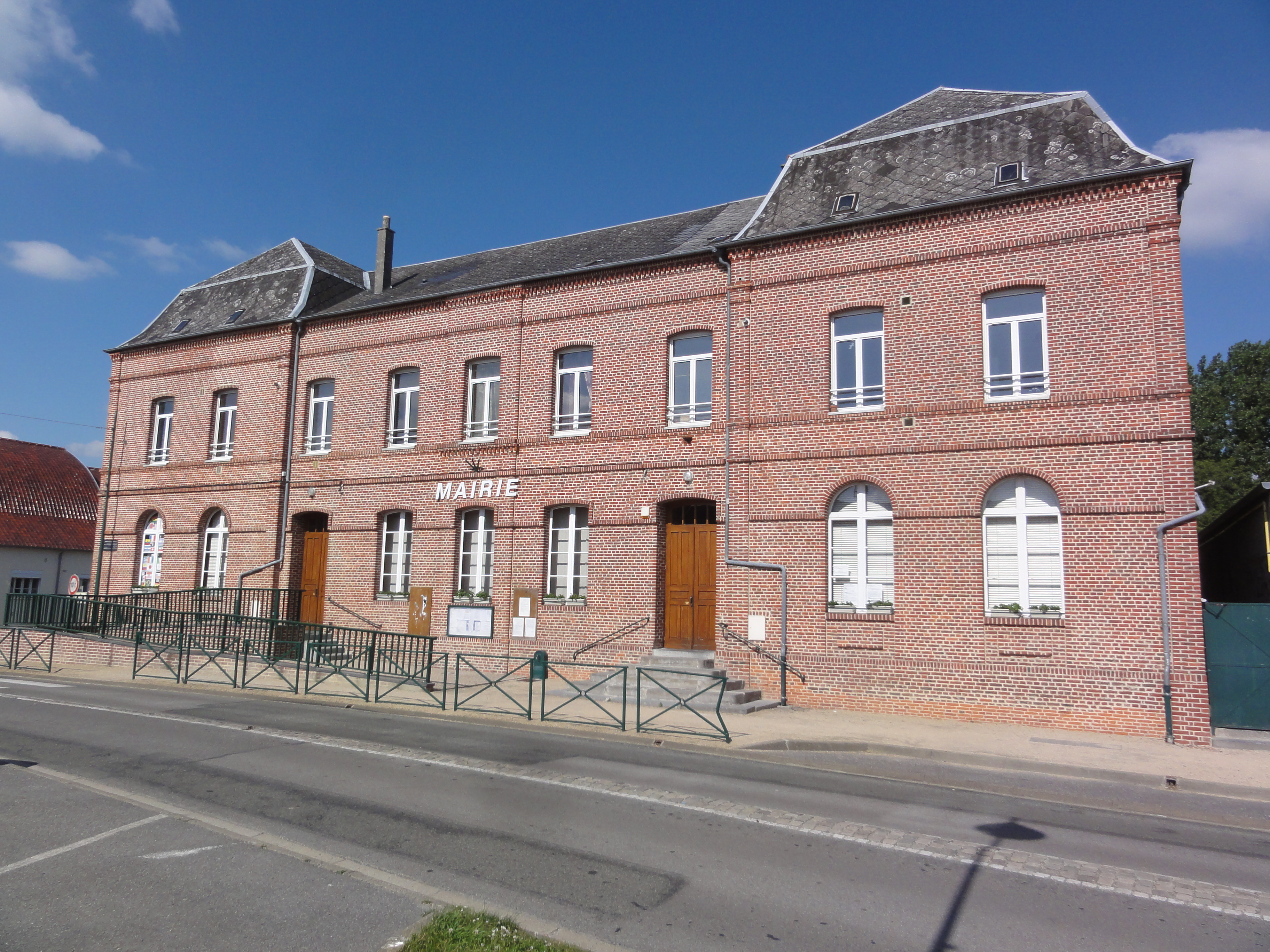 Mondrepuis (Aisne) mairie